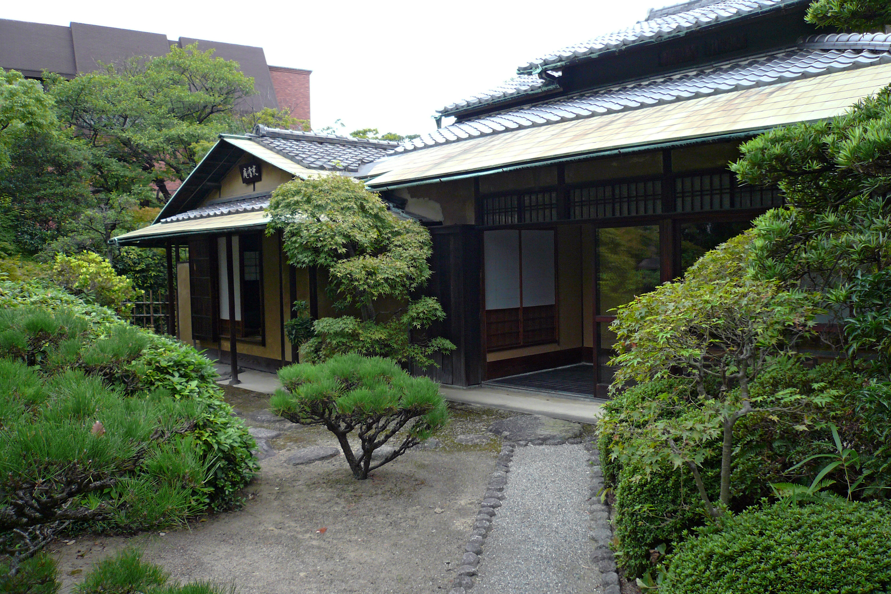 Fujita Museum in Osaka, Osaka prefecture, Japan